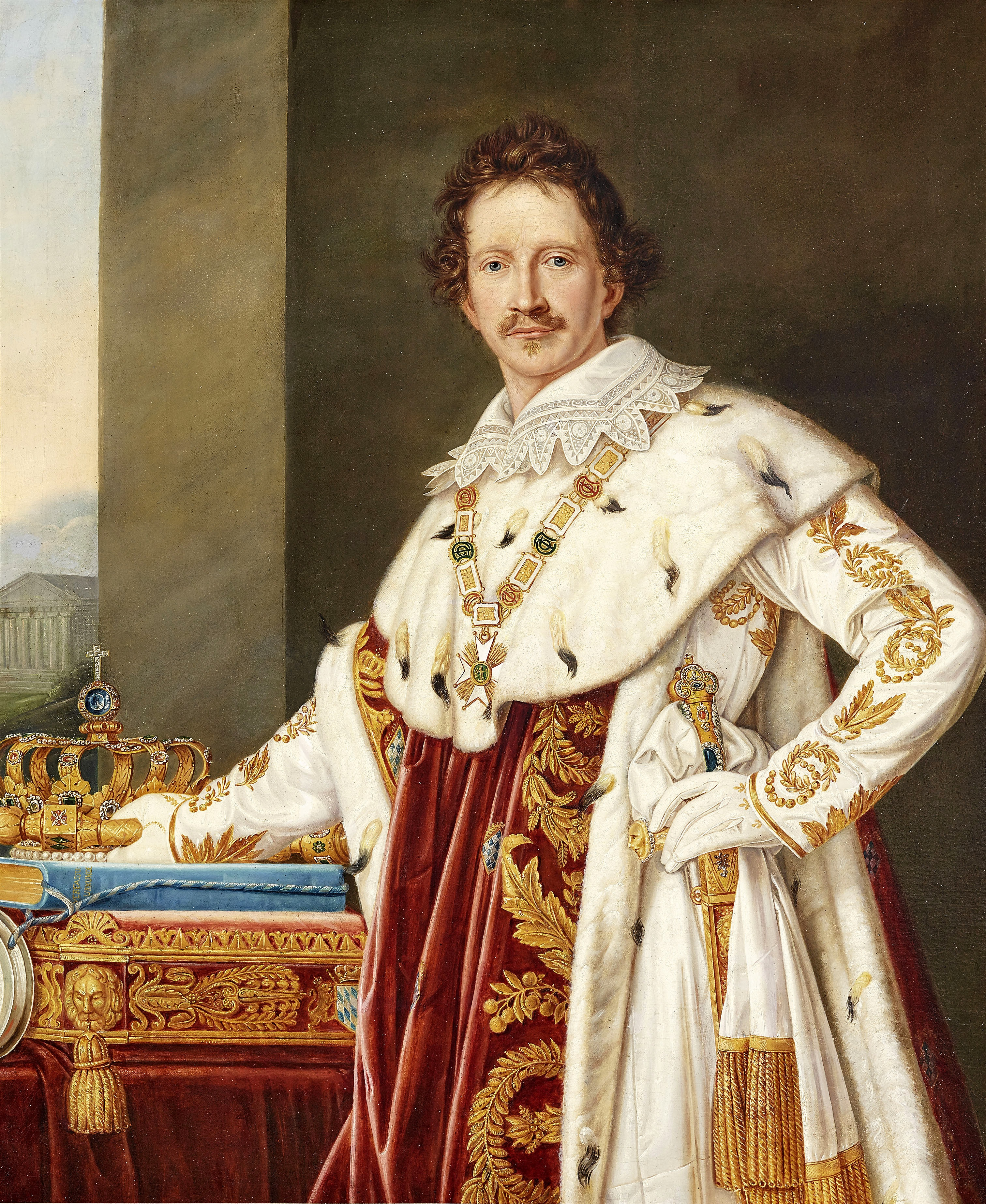 König Ludwig I. von Bayern im Krönungsornat